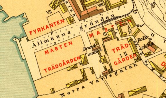 Del av "Atlas öfver Stockholm upprättad och utgifven af A.R. Lundgren 1885"